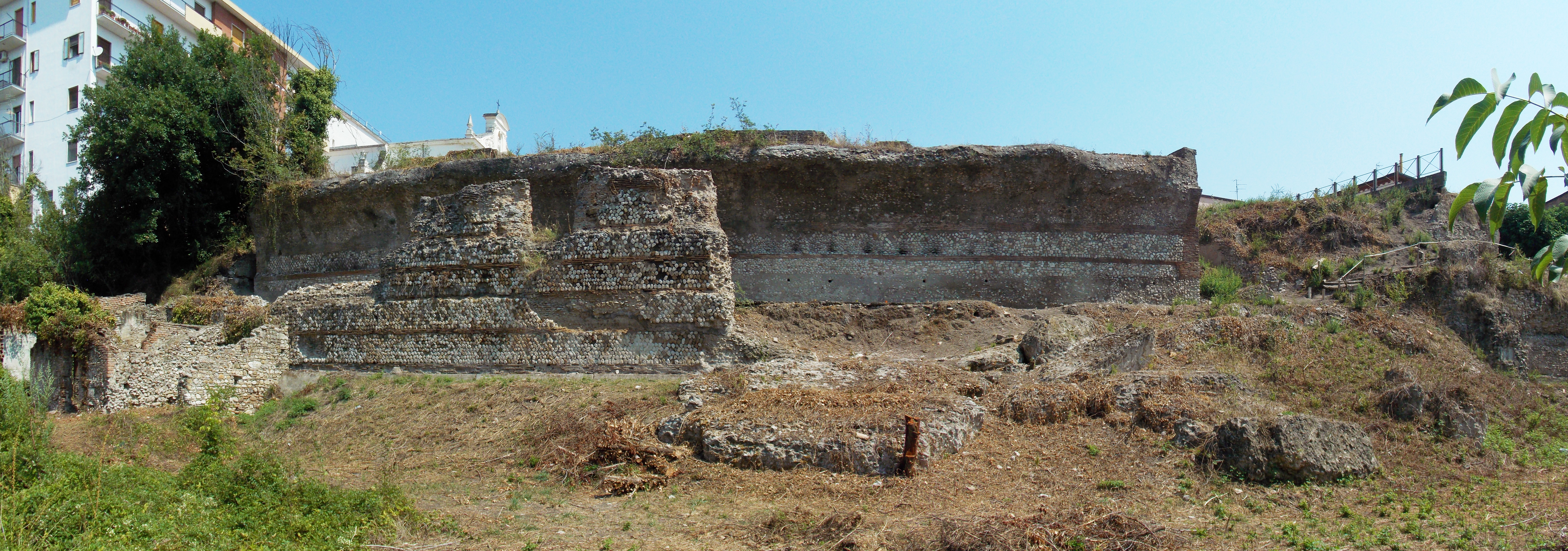 Criptoportico dei Santi Quaranta a Benevento. Vista del corridoio longitudinale